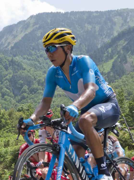 PY103812 quintana